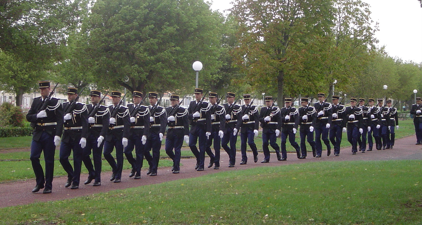 Rangée de sous-officiers de la gendarmerie à Rochefort